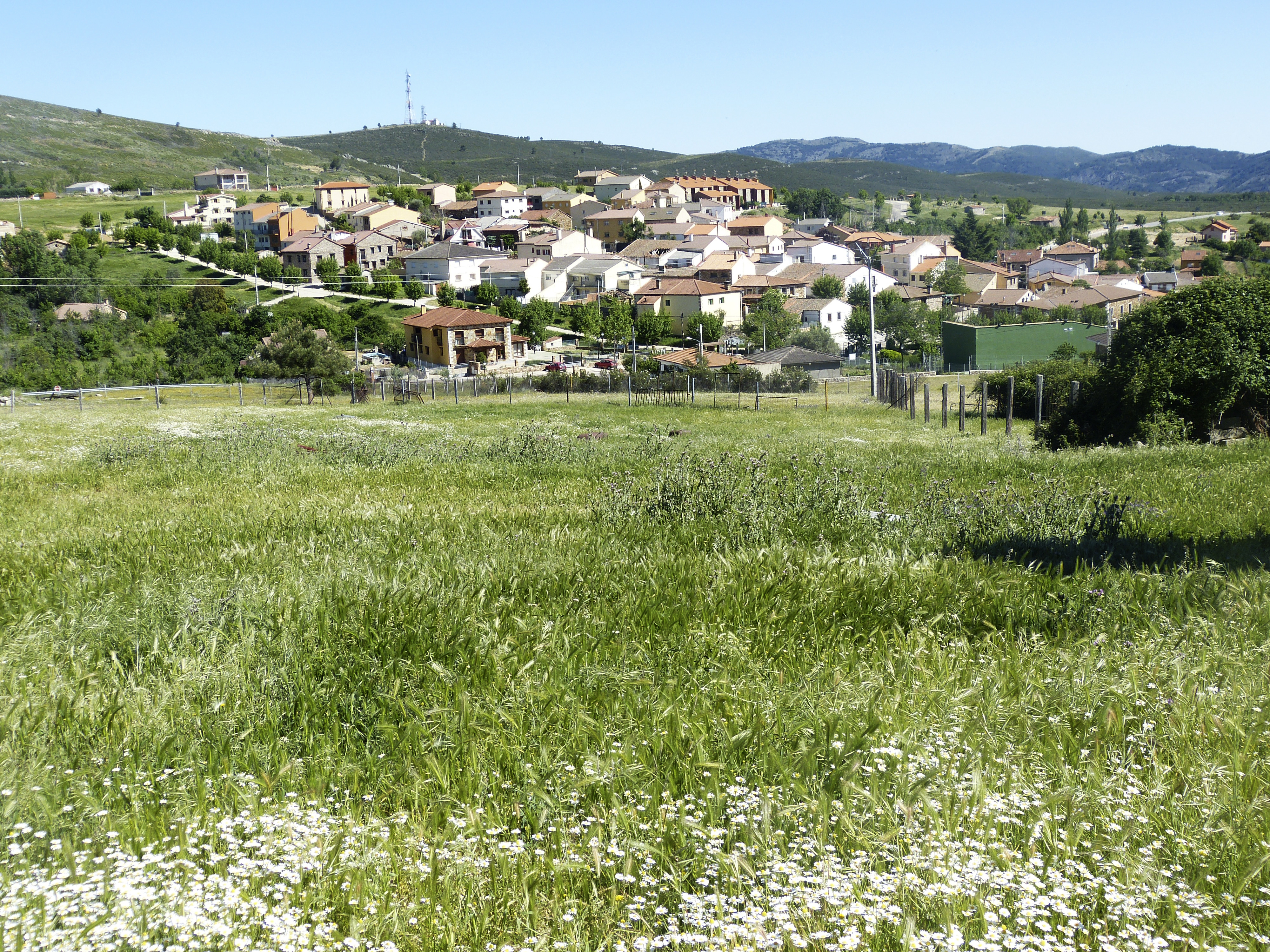 En las últimas décadas Robledillo ha cambiado de fisonomía.